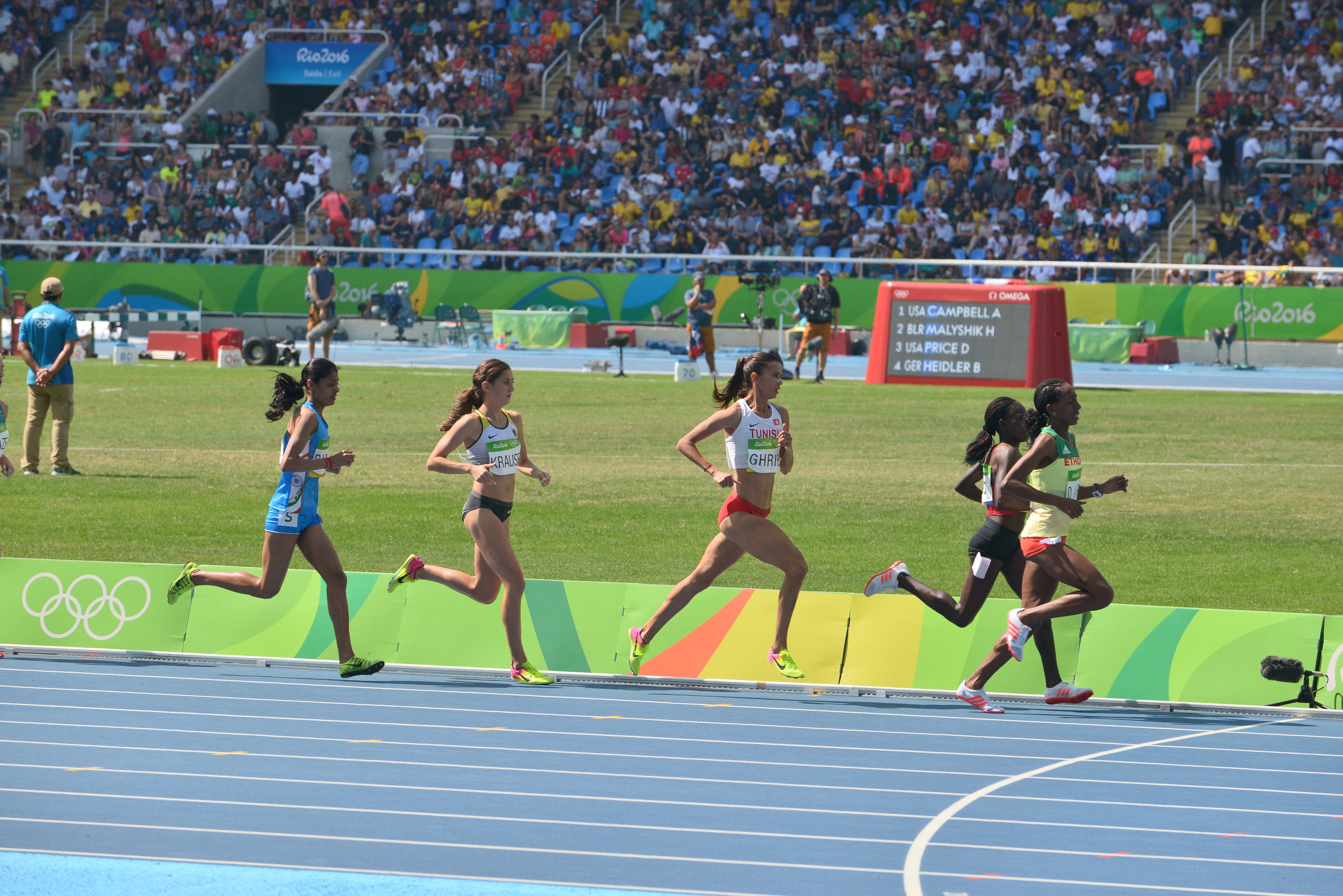 Finale du 3000m steeple des jo de Rio 2016